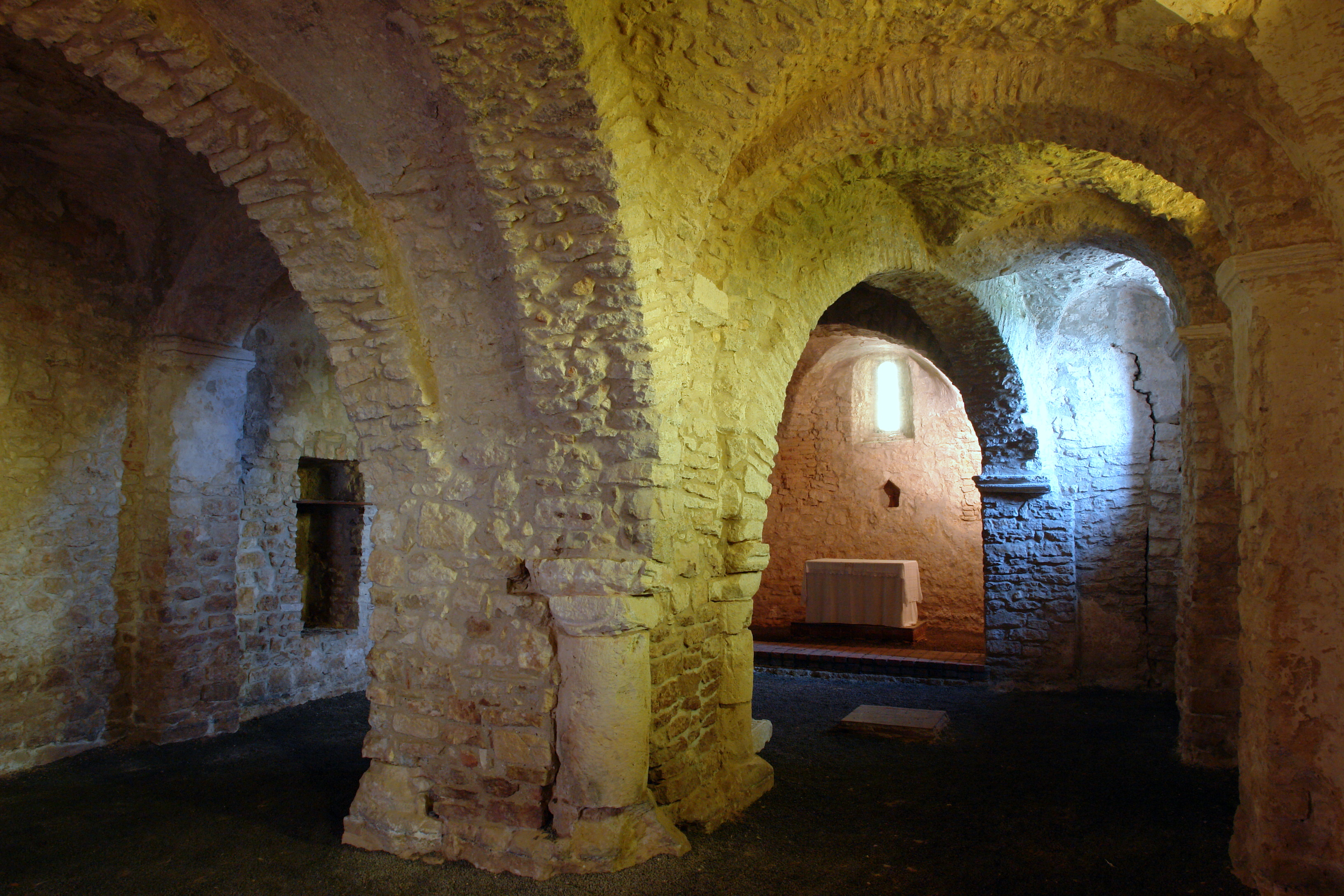 A vár kápolnája This is a photo of a monument in Hungary. Identifier: 13541